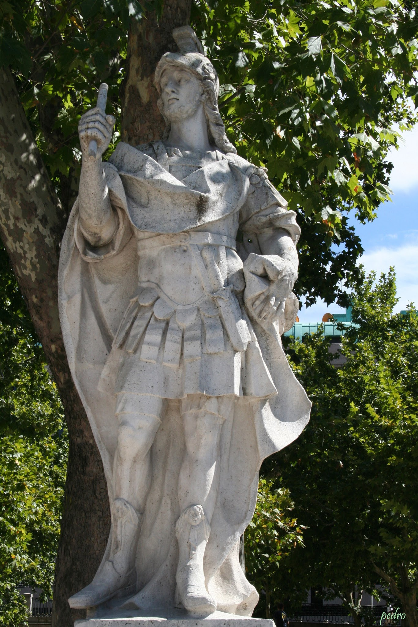 Rey De España Iñigo De Arista. Año 770.JPG